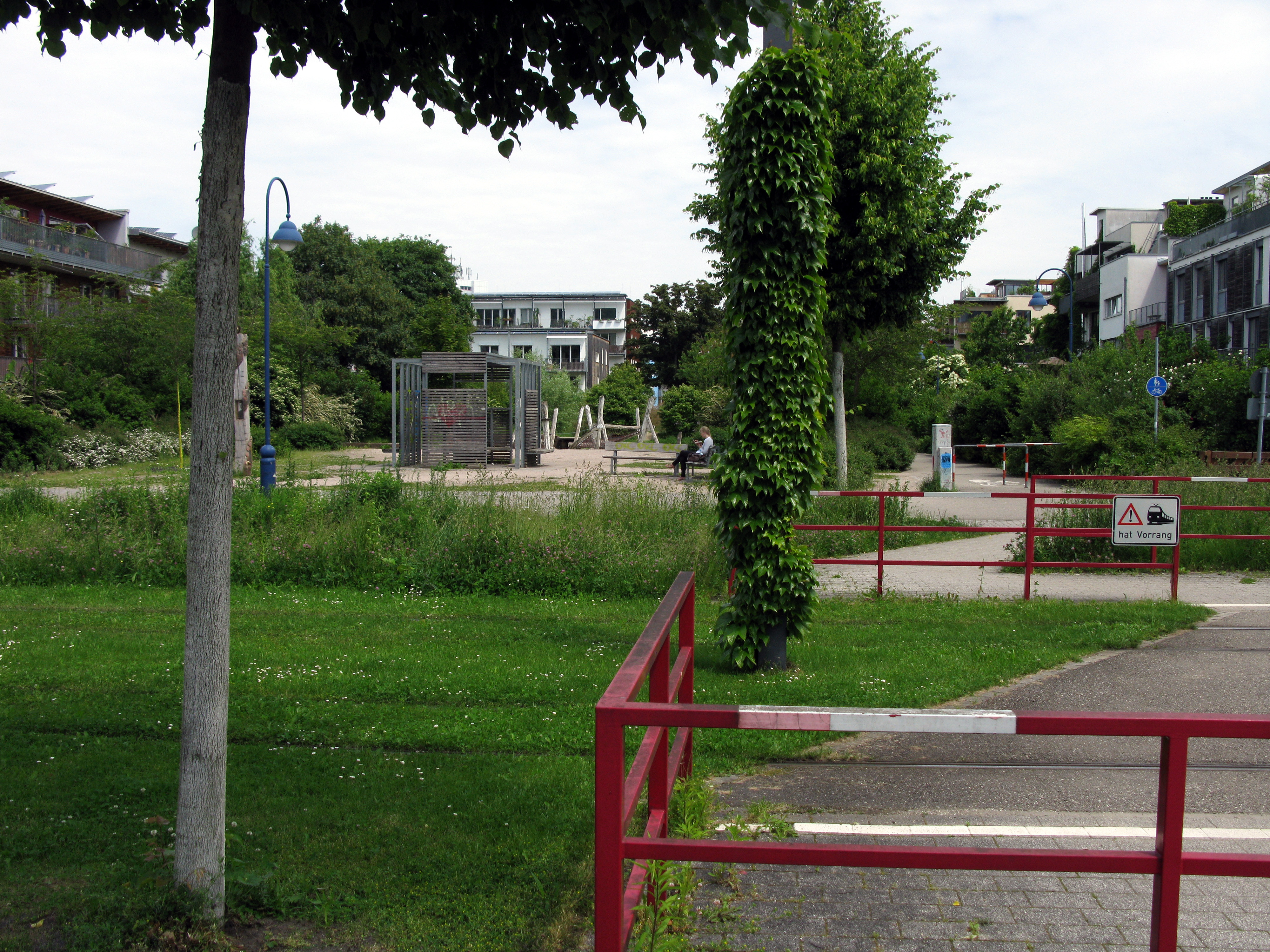 Grünspange in Freiburg-Vauban